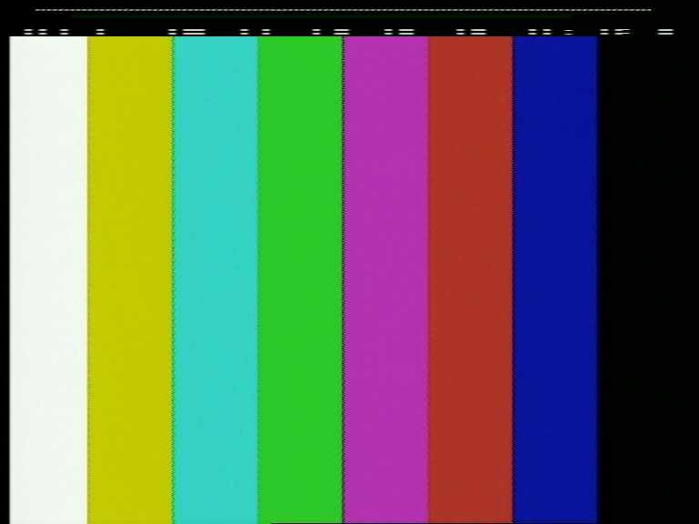 VITC am Beispiel eines PAL-Bildes, zur Darstellung der Vertikalen Austastlücke wurde das PAL-Signal um 24 Zeilen nach unten verschoben.